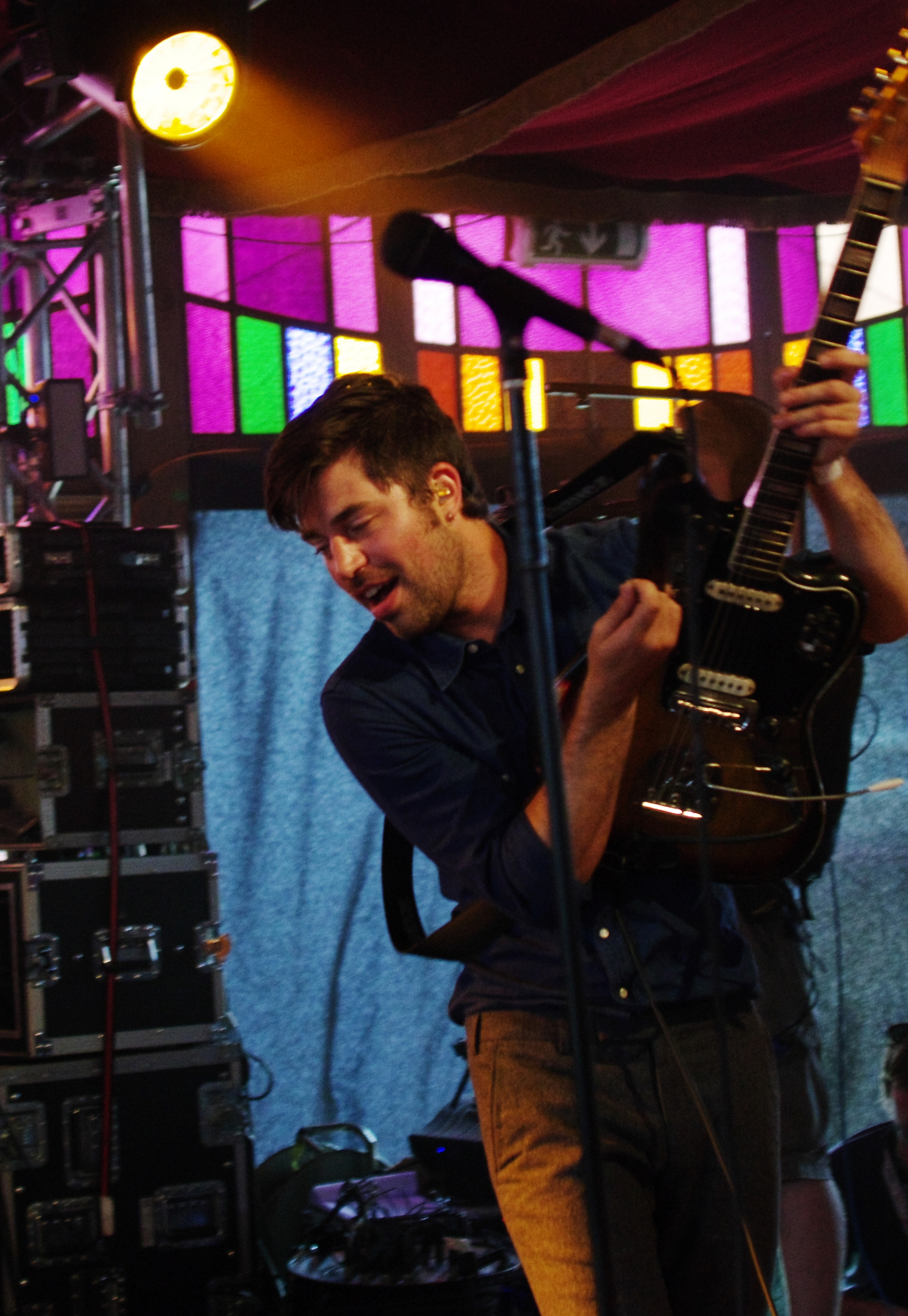 Die belgische Indie-Rockgruppe Balthazar beim Haldern Pop Festival 2013. Besetzung: Maarten Devoldere (Leadgesang, Gitarre, Keyboard); Jinte Deprez (Leadgesang, Gitarre); Patricia Vanneste (Gesang, Violine, Keyboard); Simon Casier (Bass, Gesang); Christophe Claeys (Schlagzeug)